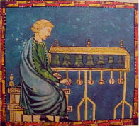 En munk som spiller på et klokkespill med syv klokker. Klokkene er merket (A, B), C, D, E, F, G.